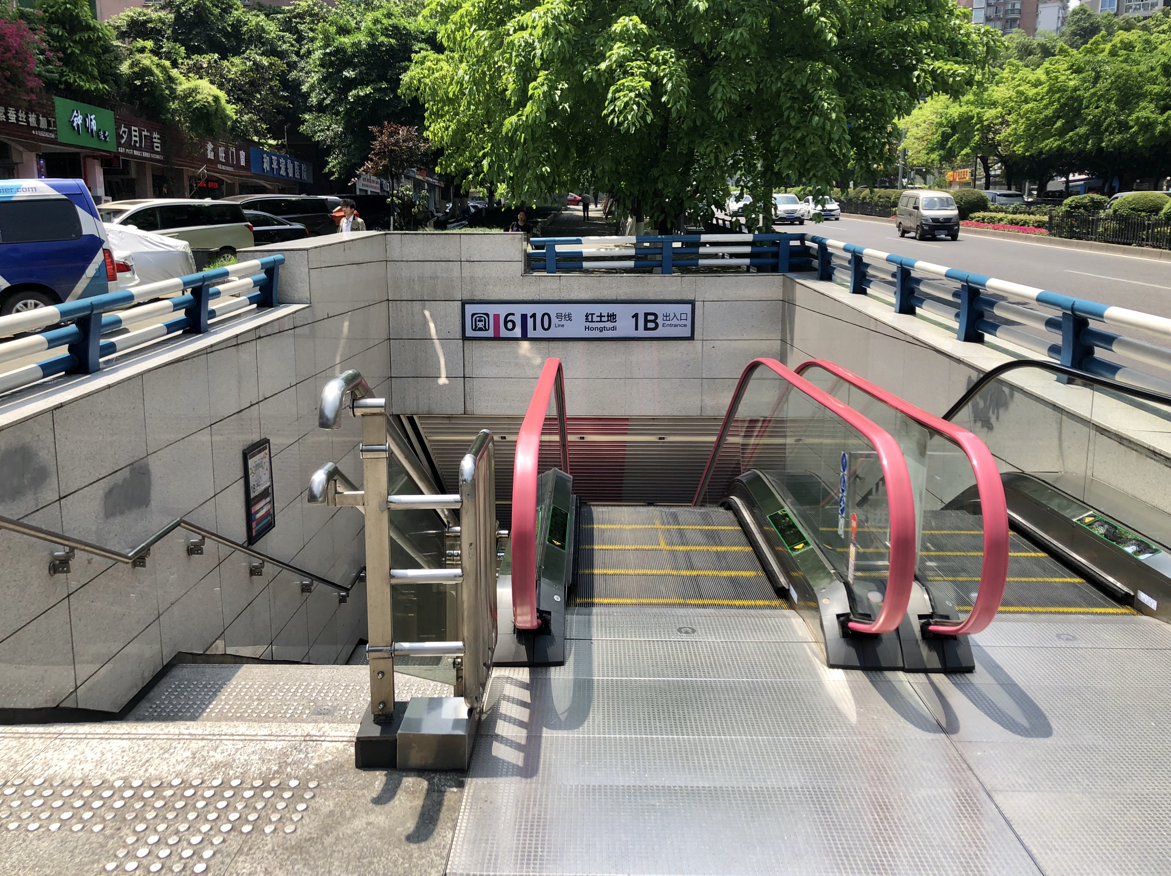 6号线红土地站1B出口